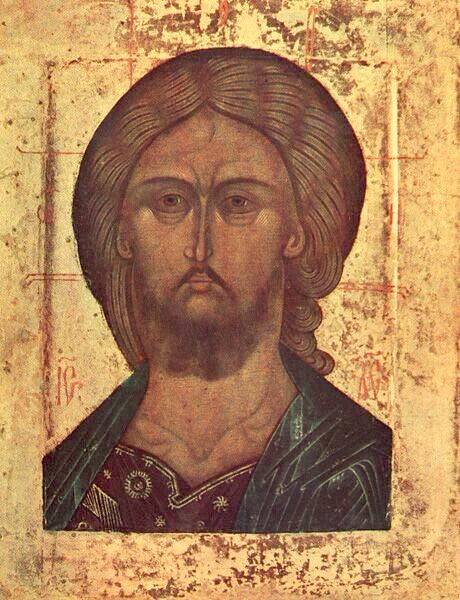 Спас оплечный, Москва, 15 век